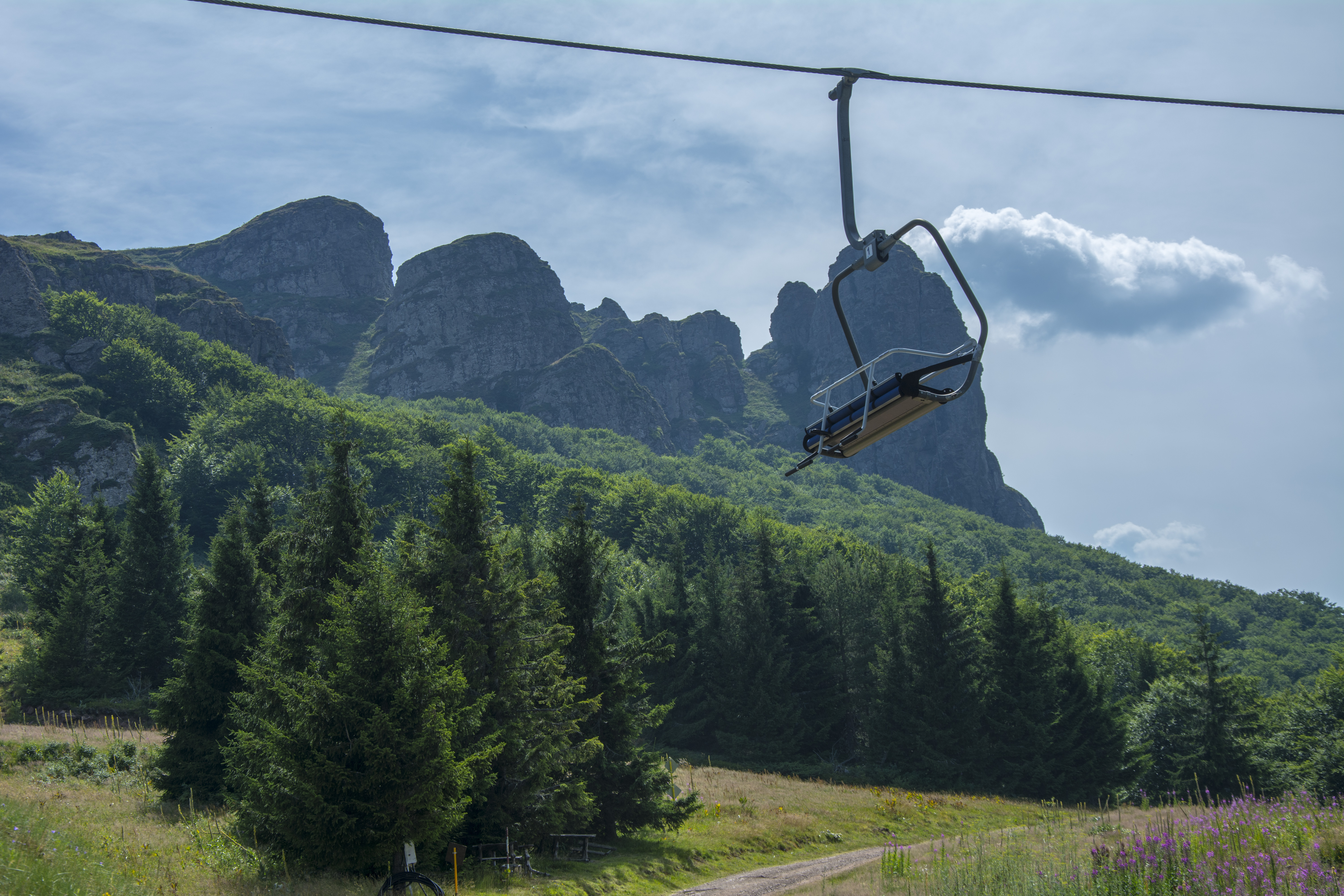 Babin zub i žičara